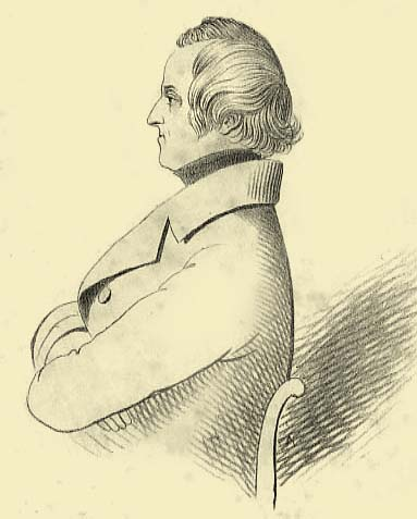 Portrait von Moritz Leopold Petri, Bleistiftzeichnung